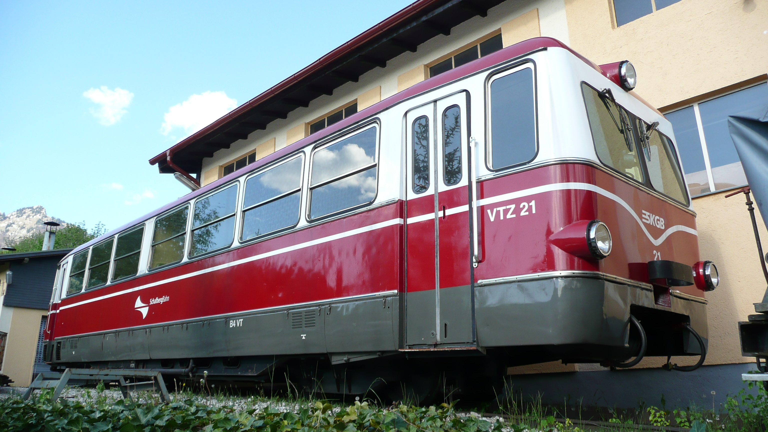 Triebwagen VTZ 13 der Schafbergbahn im Bahnhof St. Wolfgang